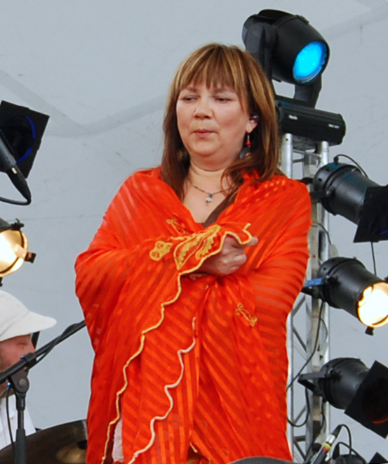 Norwegian singer Mari Boine.